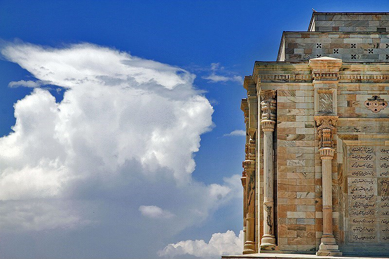 آرامگاه فردوسی در توس، ایران.